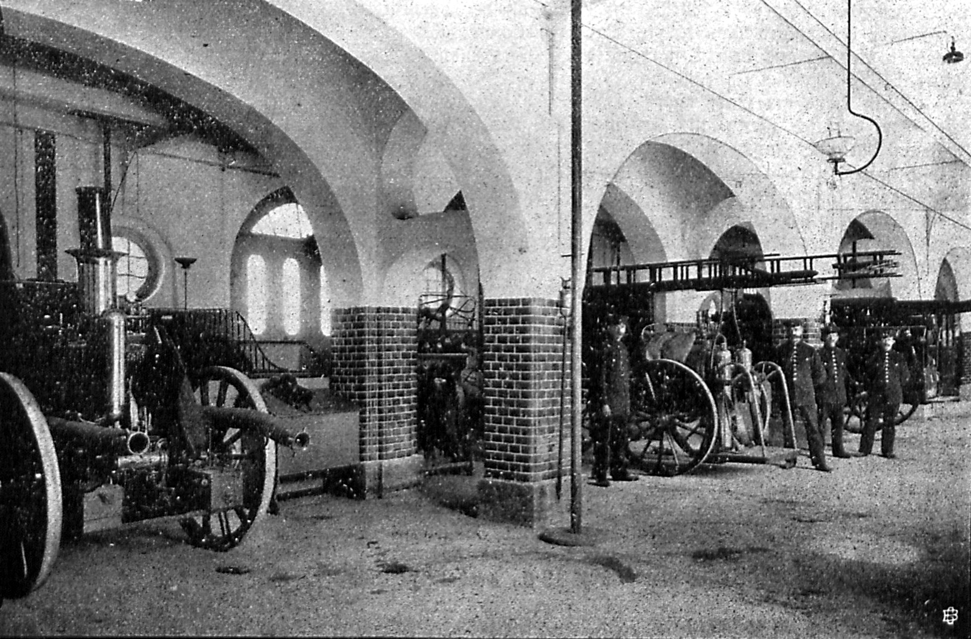 Blick in die Halle für Alarmfahrzeuge